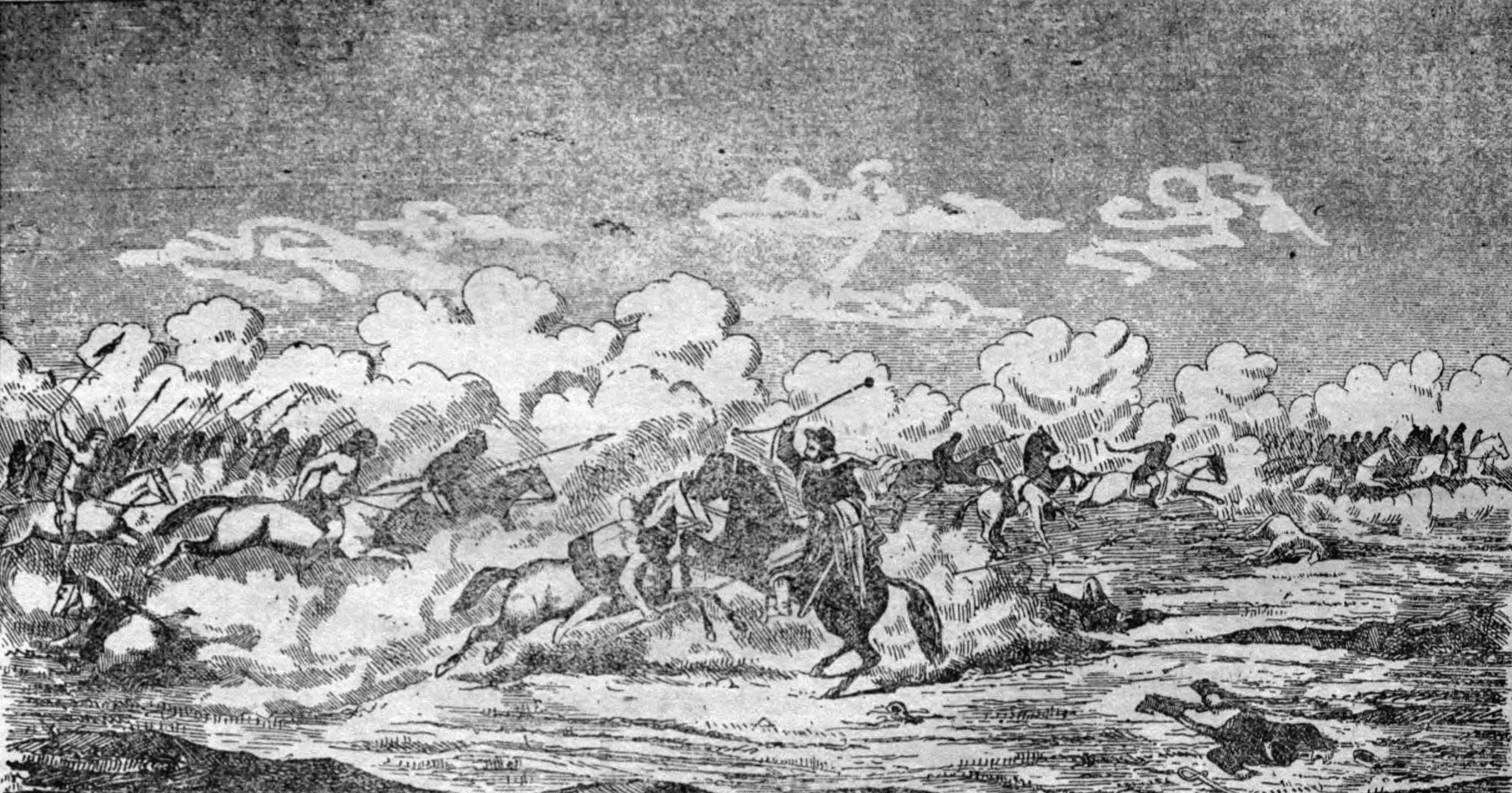 Esta imagen forma parte del libro El Gaucho Martín Fierro incluido en Commons, siendo parte del proyecto de transcripción de páginas de Wikisource en español.